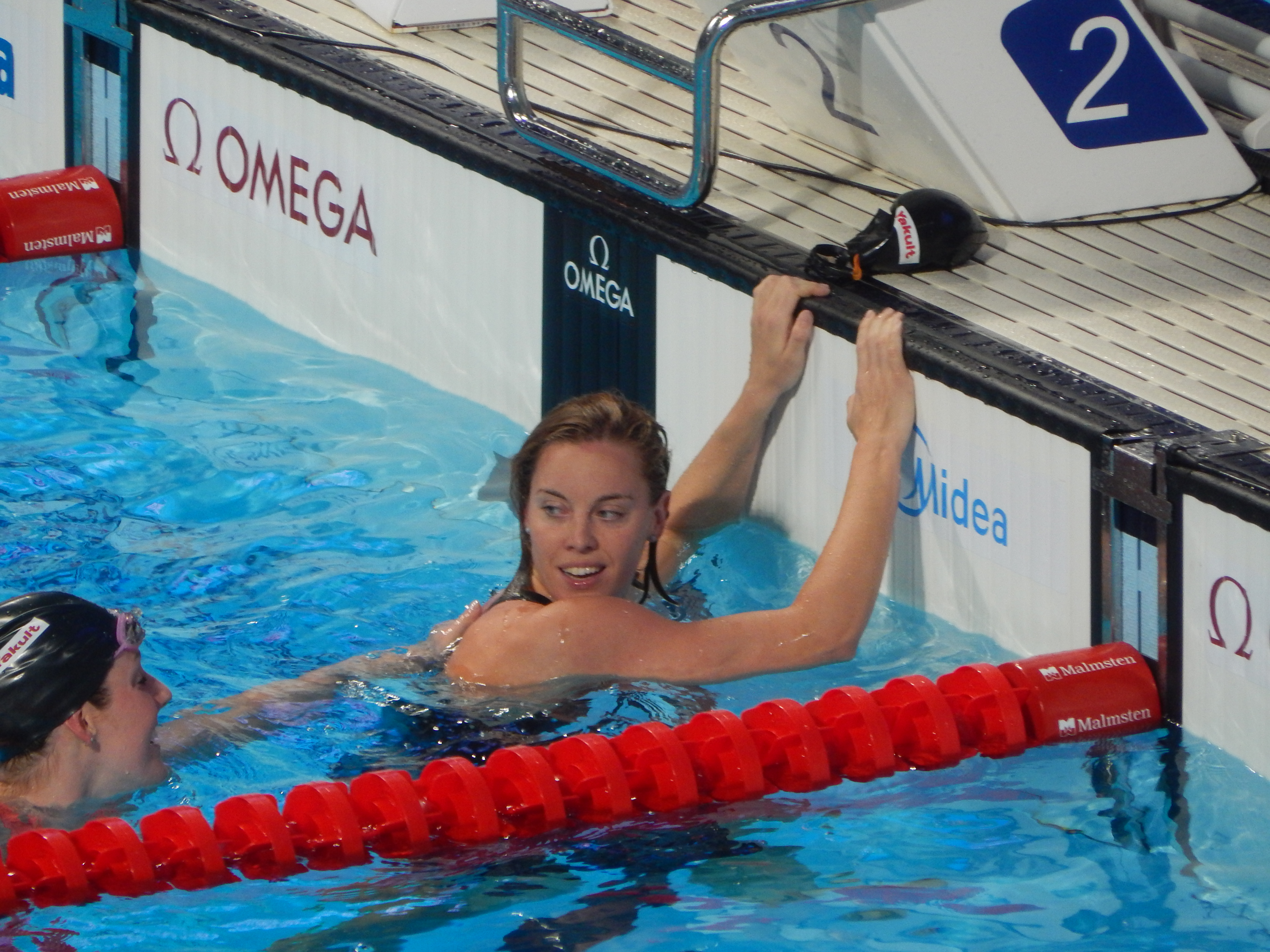 Фемке Хемскерк после финала смешанной эстафеты вольным стилем в Казани